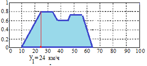 рис4